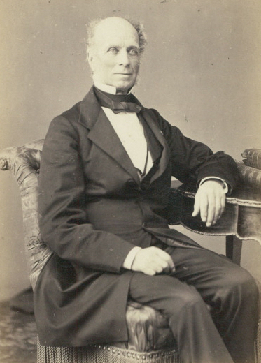 Henry Barbet (1789-1875)